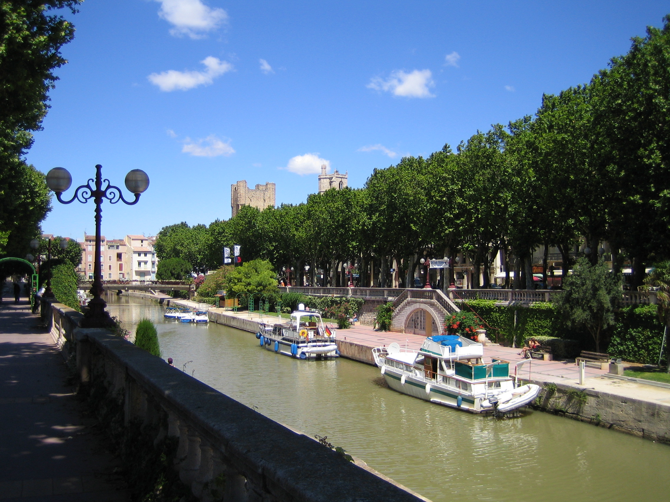 Vue du canal à Narbonne (2005-07-05T12-37-31_narbonne.jpg)